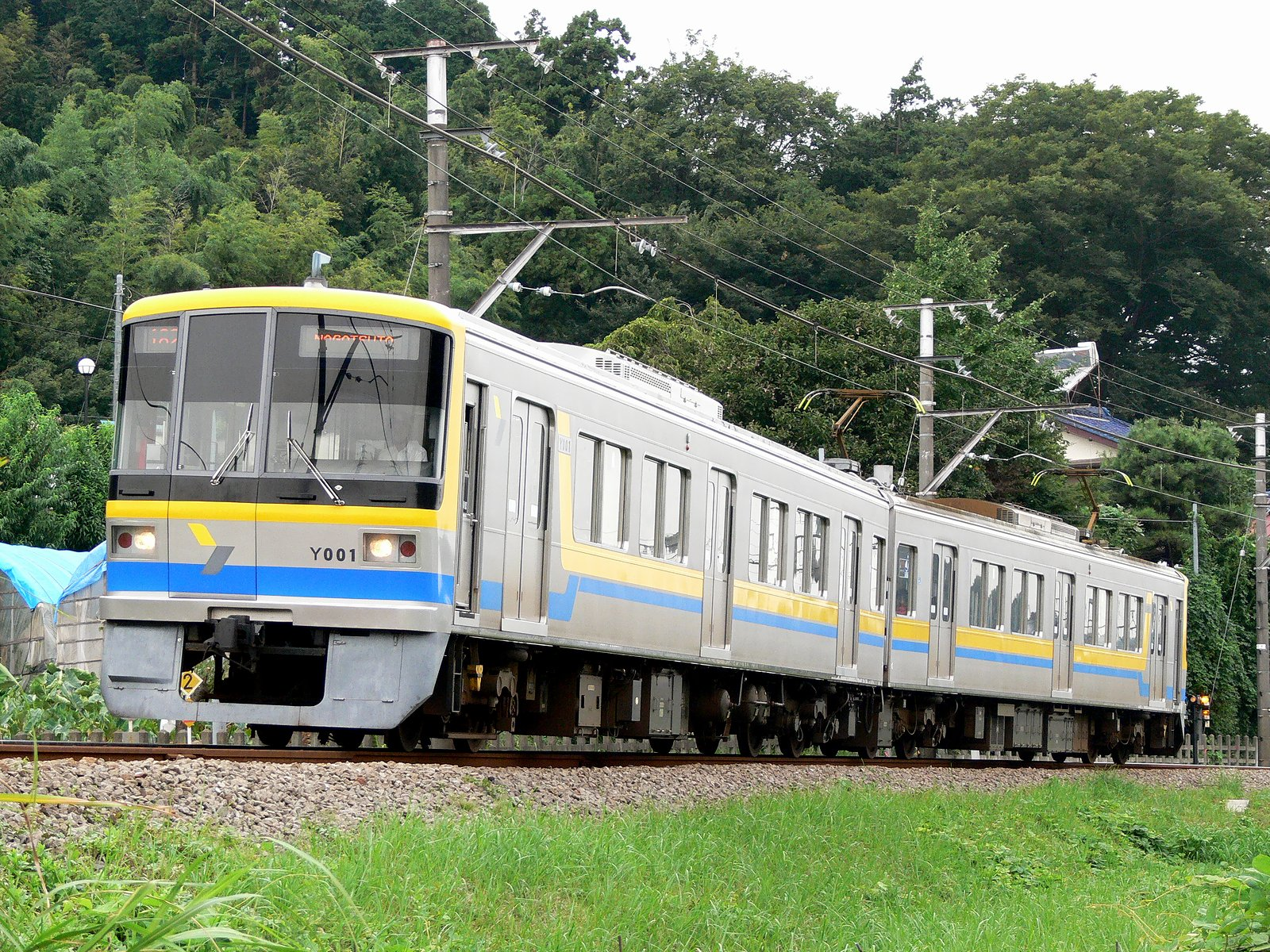 Yokohama minatomirai railway series"Y000"横浜高速鉄道Y000系電車.